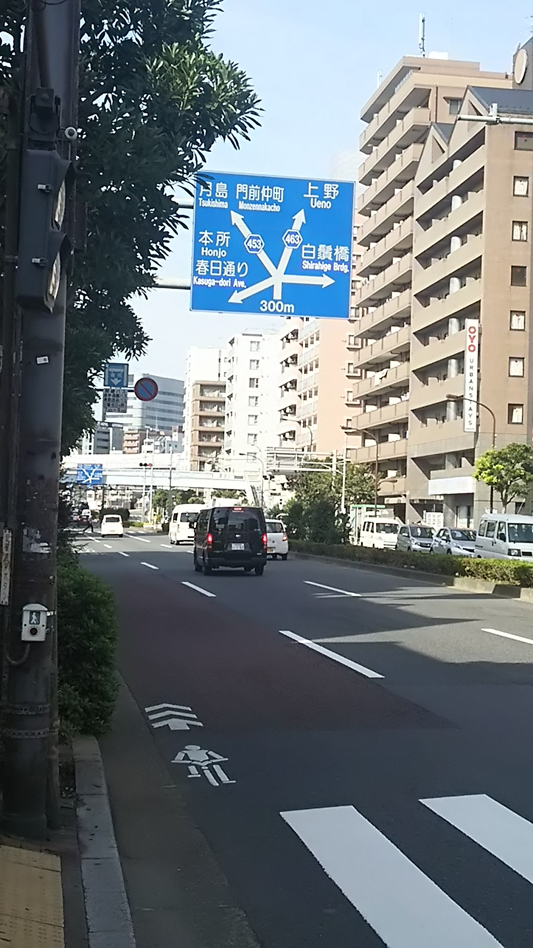 2019年9月撮影 東京都道453号 墨田区吾妻橋にて